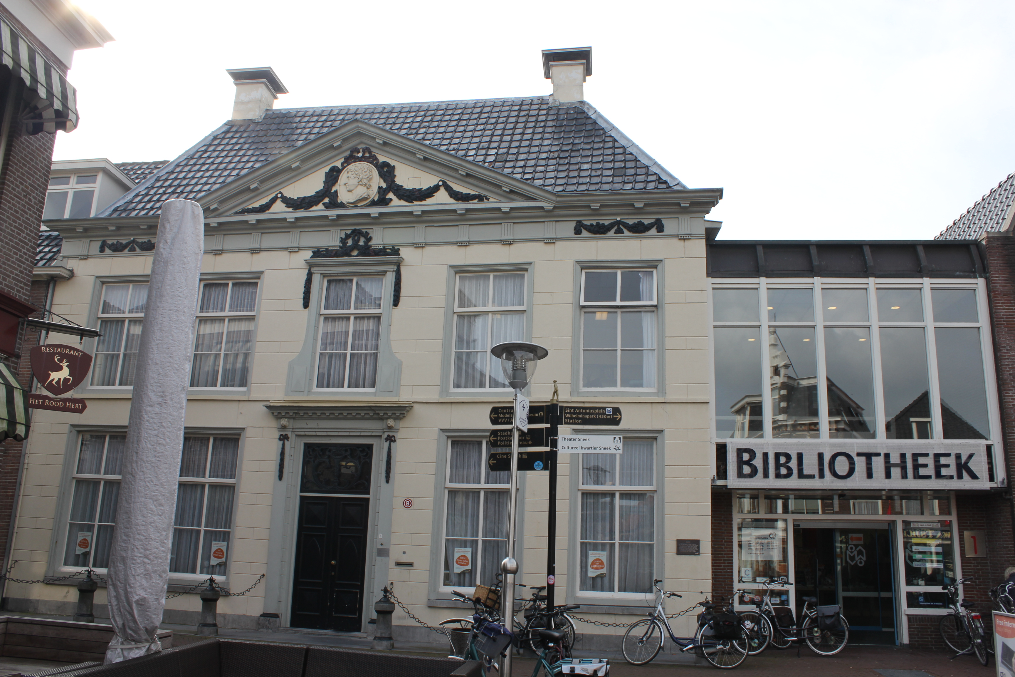 Deftig woonhuis met verdieping en versierde kroonlijst onder schilddak met hoekschoorstenen met borden. Hier is nu de openbare bibliotheek gevestigd.